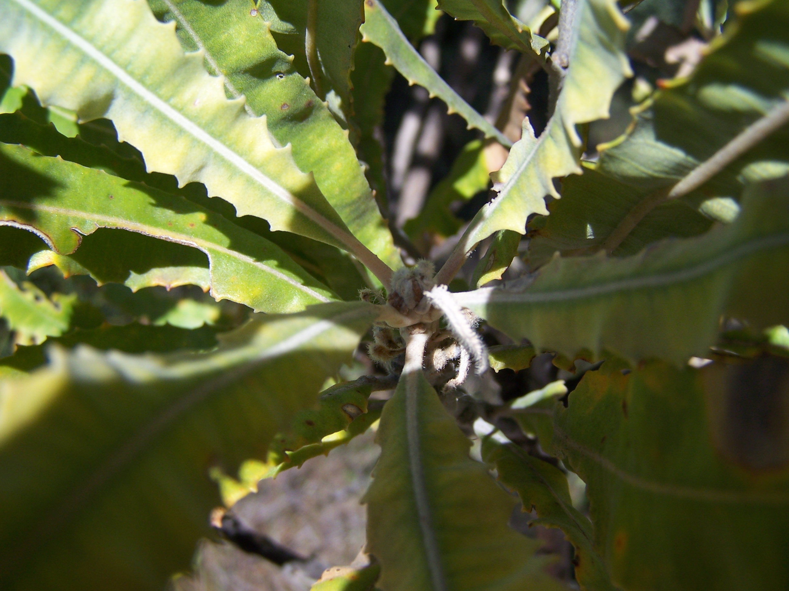 Banksia menziesii